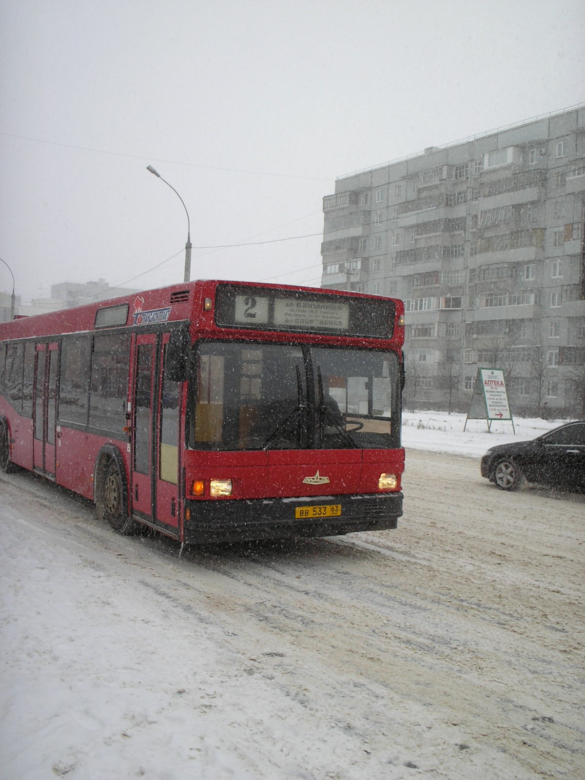 Астобус № 2, Тольятти